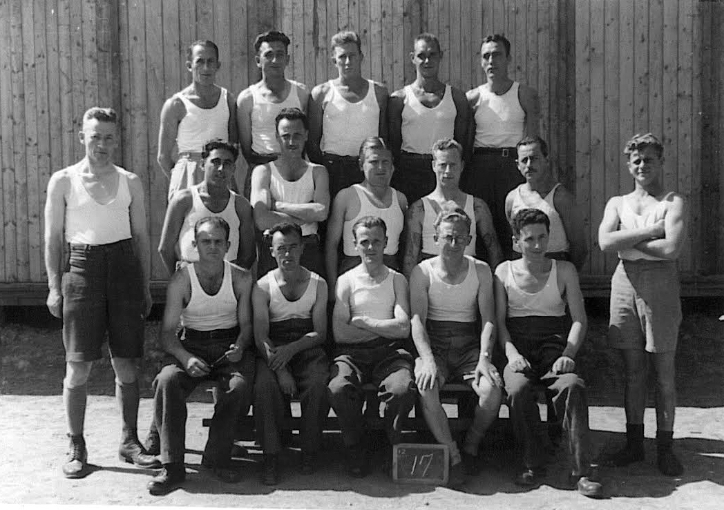 חפרים בשבי